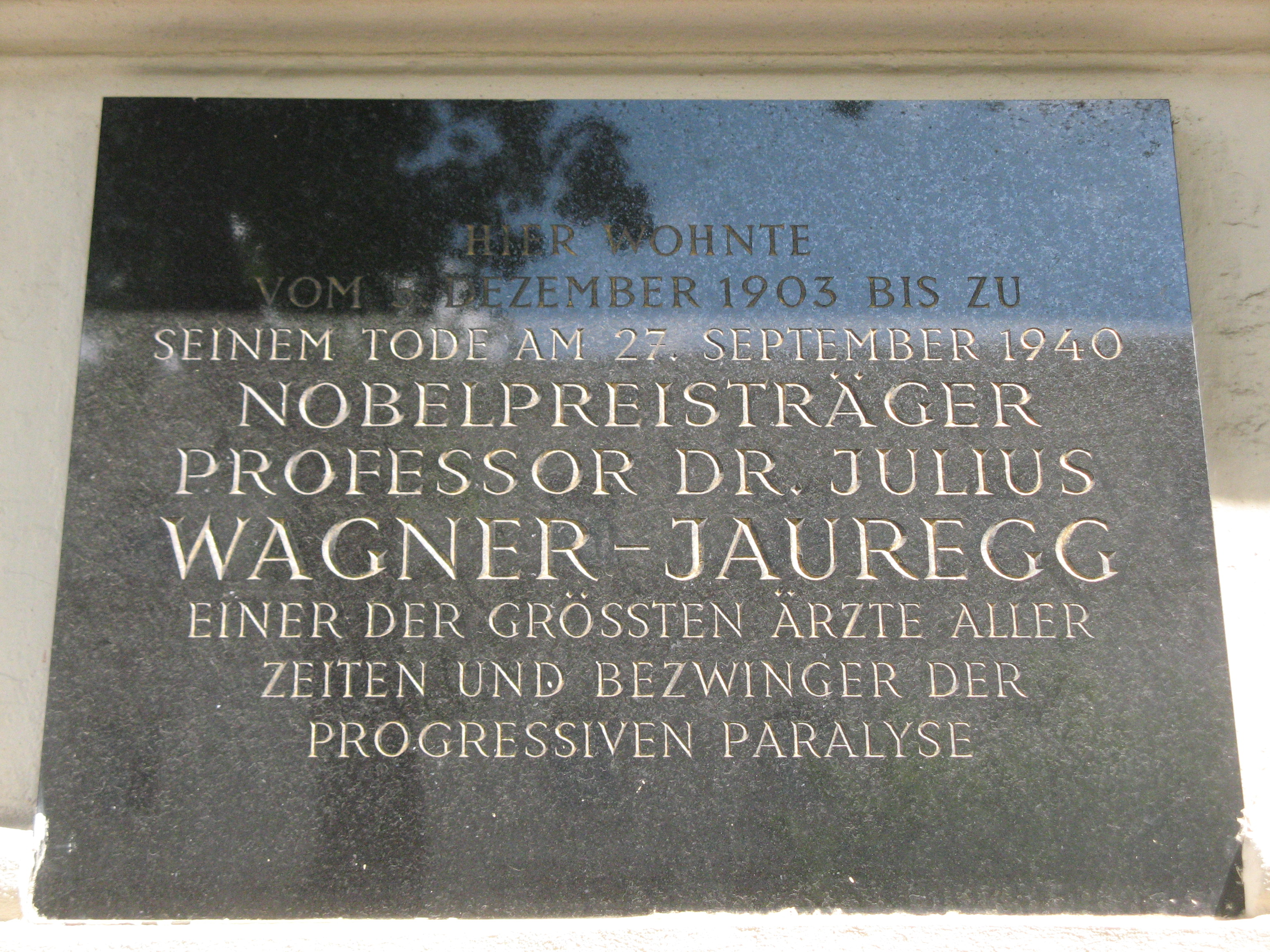 Gedenktafel am Wohnhaus von Julius Wagner-Jauregg, Landesgerichtsstraße 18, Wien-Innere Stadt